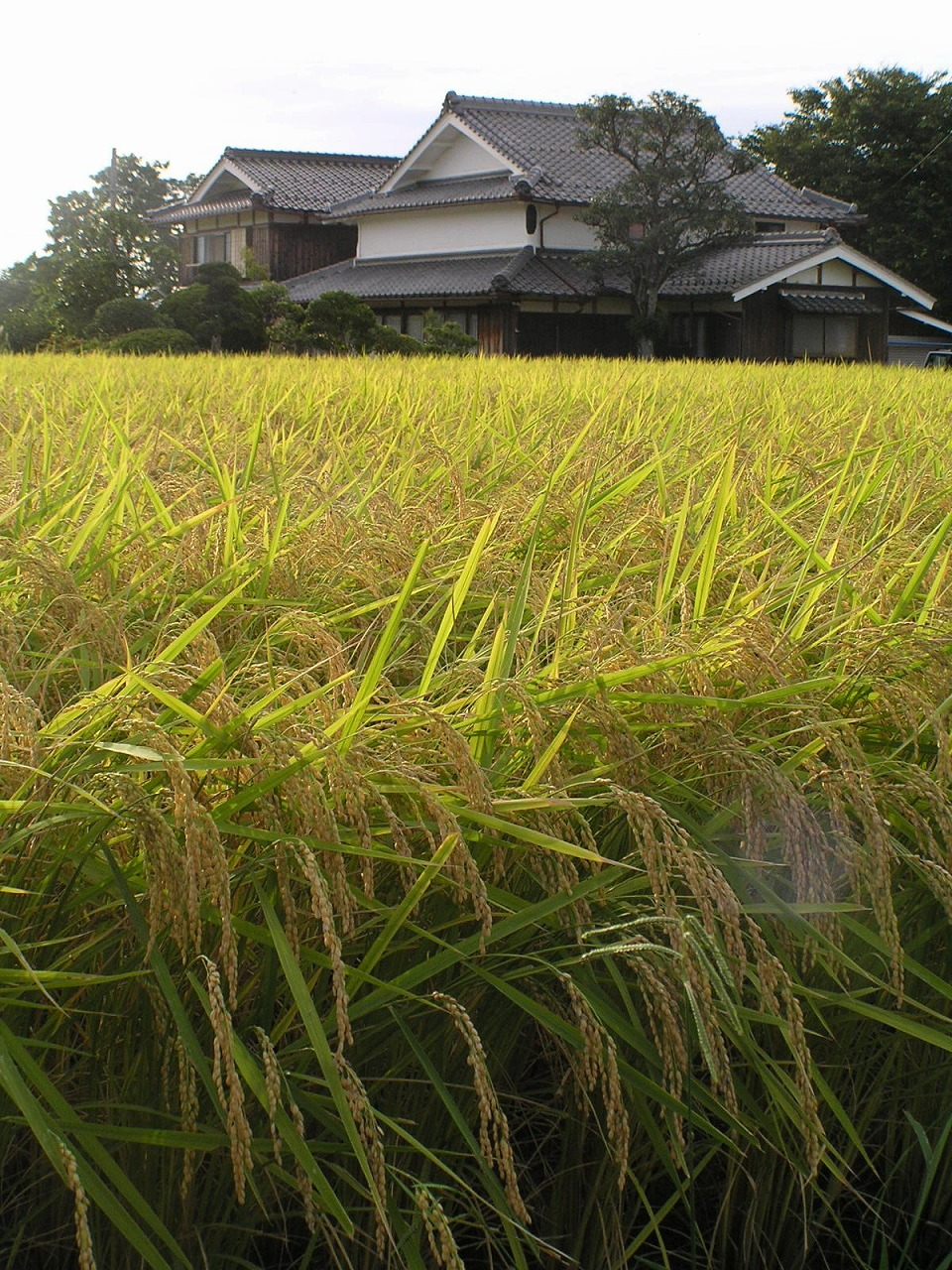 稲穂